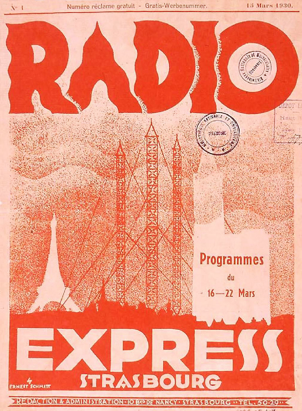 Radio Express Strasbourg : Programmes du 16 - 22 mars 1930. Bibliothèque nationale et universitaire de Strasbourg